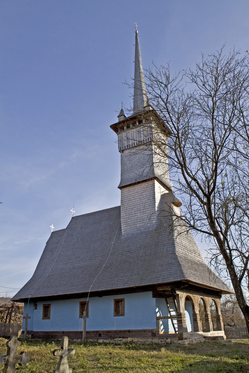 Biserica de lemn (1813) din Lozna, judeţul Sălaj.